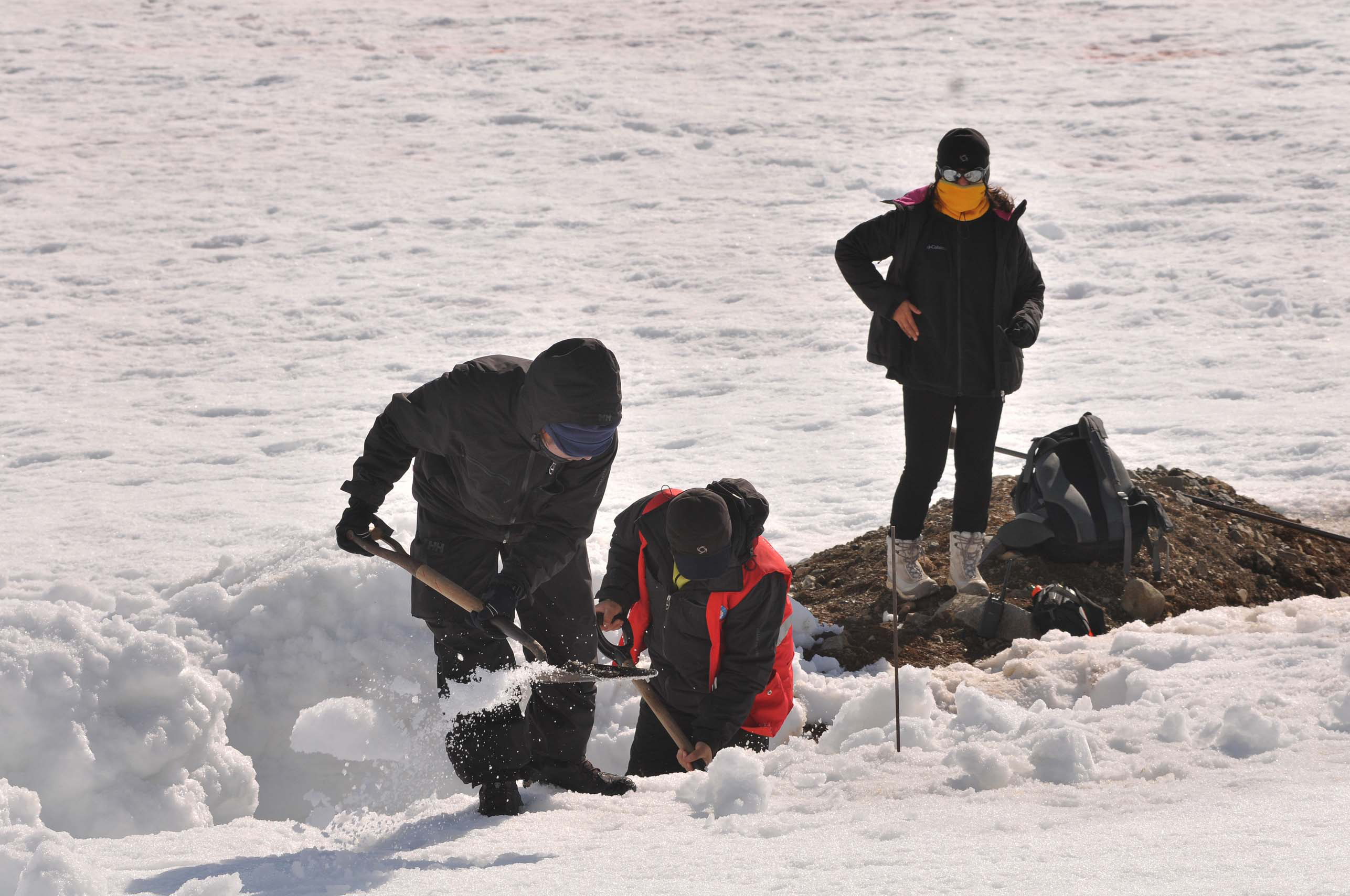 La Estación Científica Antártica “Machu Picchu”- ECAMP recibió a los expedicionarios peruanos para el inicio de los labores de la campaña ANTAR XXIII que se viene realizando desde el 19 de enero y continuará hasta el 18 de febrero. Los 43 exploradores pertenecientes a diferentes instituciones públicas y privadas involucradas con las actividades de investigación científica, académica, de gestión ambiental y de apoyo logístico que lidera el Ministerio de Relaciones Exteriores, trabajan con el objetivo de profundizar el aporte científico del Perú al conocimiento de la Antártida; actualizar los estudios técnicos de base para la formulación de proyectos orientados al fortalecimiento de la infraestructura antártica nacional; fortalecer la cooperación con otros Estados Parte del Tratado Antártico; y, contribuir a la difusión del valor de la Antártida como Reserva Natural para la Paz y la Ciencia. Asimismo, los científicos del Instituto Geológico Minero y Metalúrgico (INGEMMET), realizan estudios para mejorar la infraestructura que tiene el Perú en la Antártida a fin de encontrar nuevas fuentes de agua que serán usadas en nuestra estación científica.